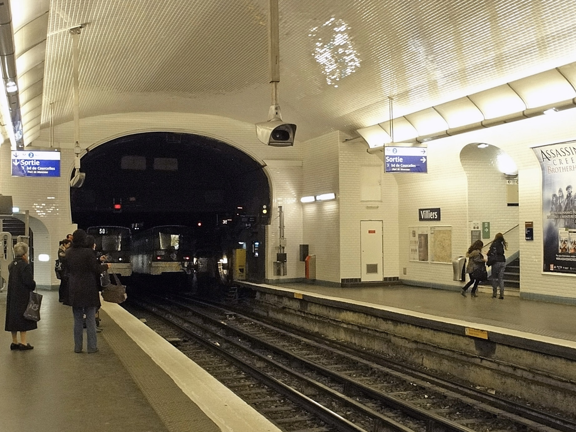 Station Villiers de la ligne 3 du métro de Paris, France.